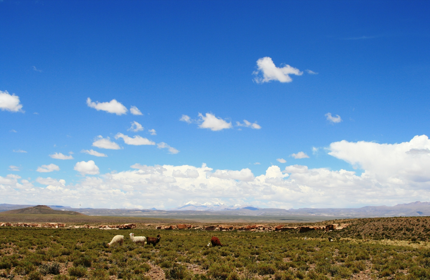 vista del altiplano boliviano